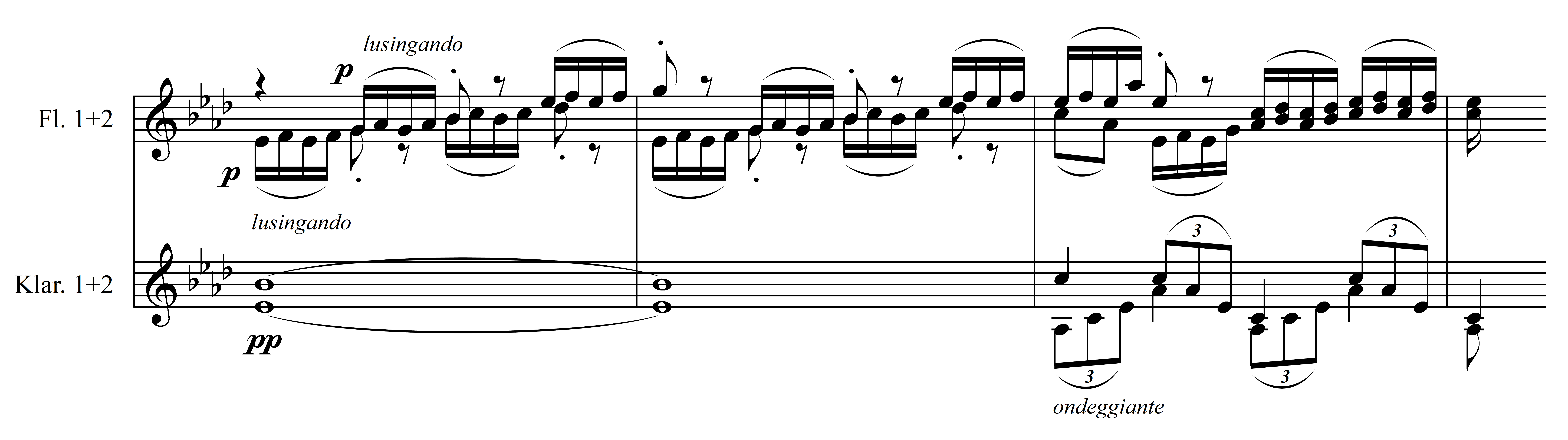 Notenbeispiel Smetana Die Moldau Mondschein+Nymphenreigen T.185-187